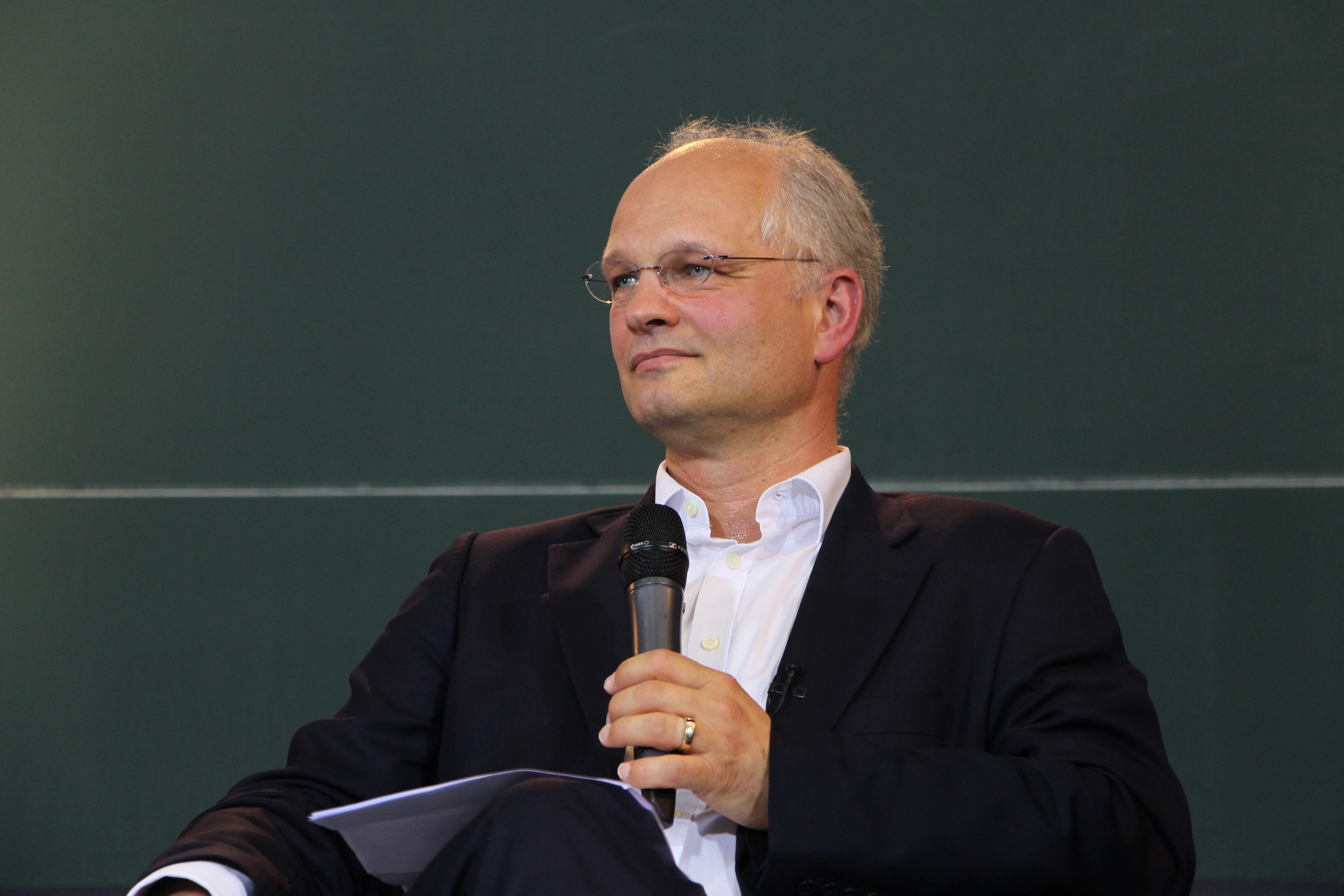 Historikertag 2014 in Göttingen.